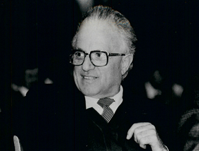 Alfons Benedikter, Titelseite